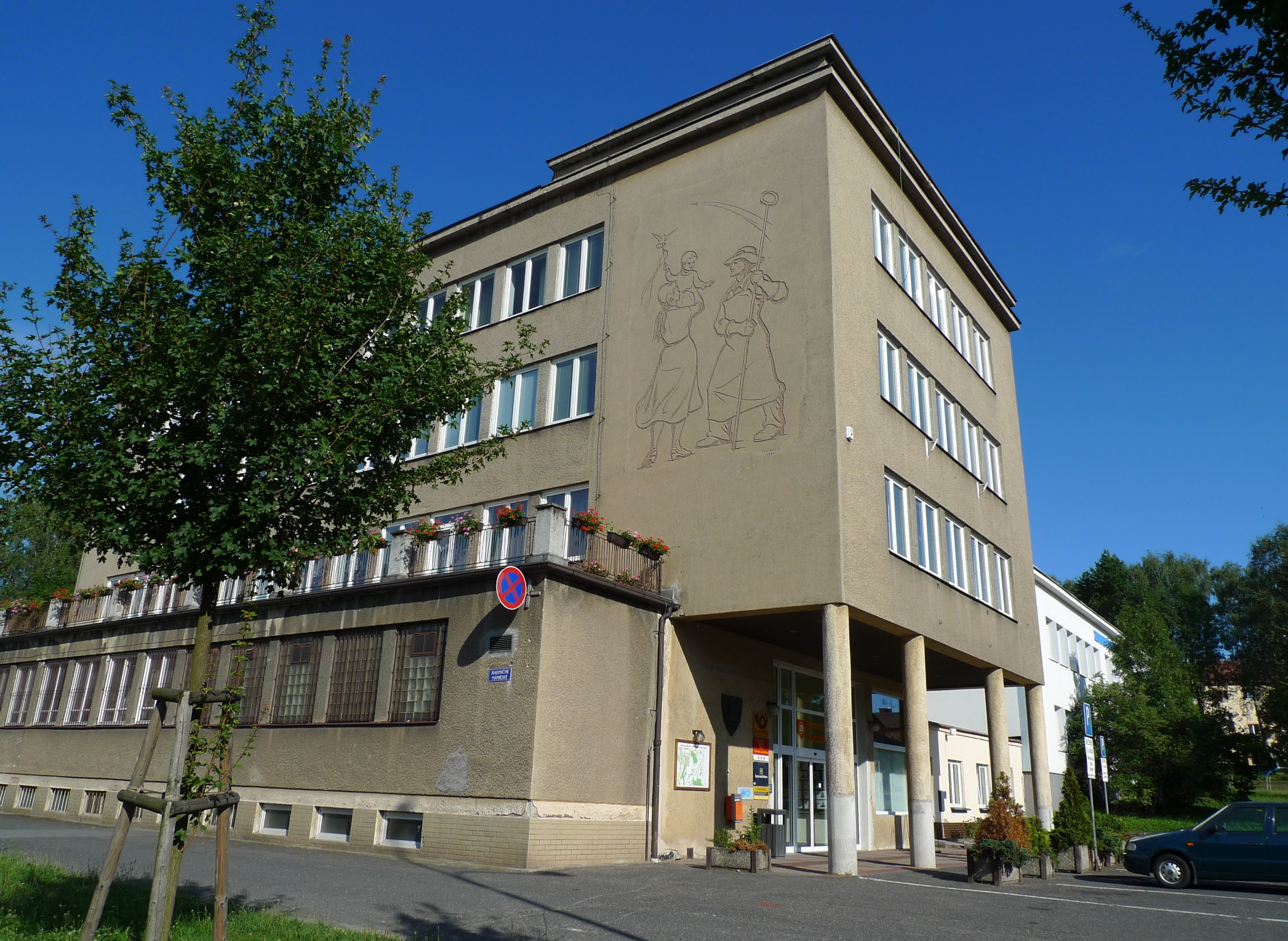 Vratimov